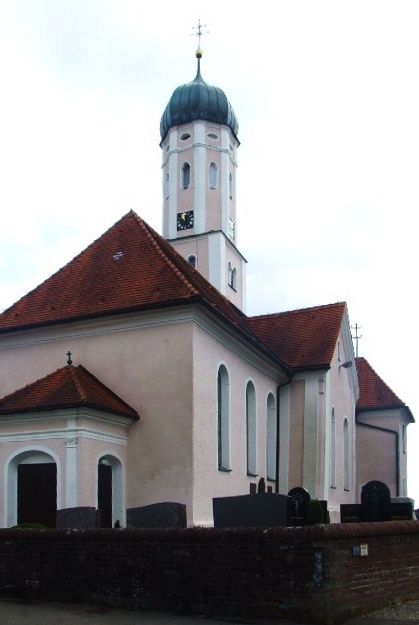 Pfarrkirche Tafertshofen, GemeindeKettershausen, Landkreis Unterallgäu